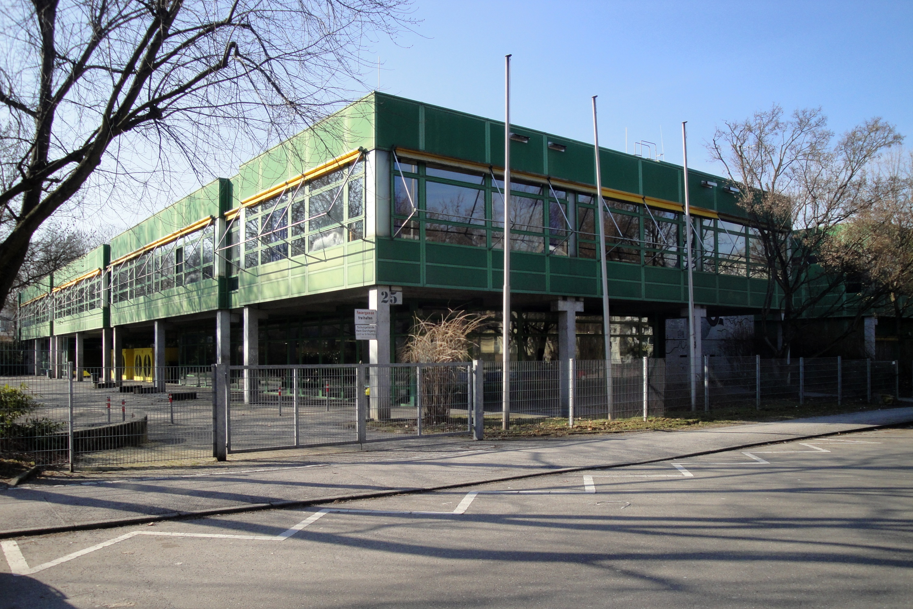 Johannes-Gutenberg-Schule Stuttgart (JGS) - Zentrum für Druck und Kommunikation, Stuttgart